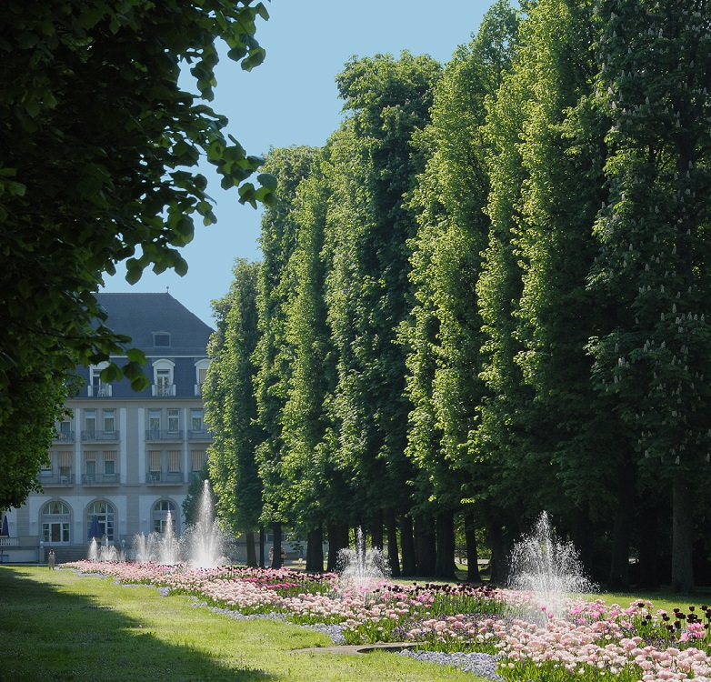 Die Springbrunnenallee mit dem Hotel Steigenberger im Hintergrund